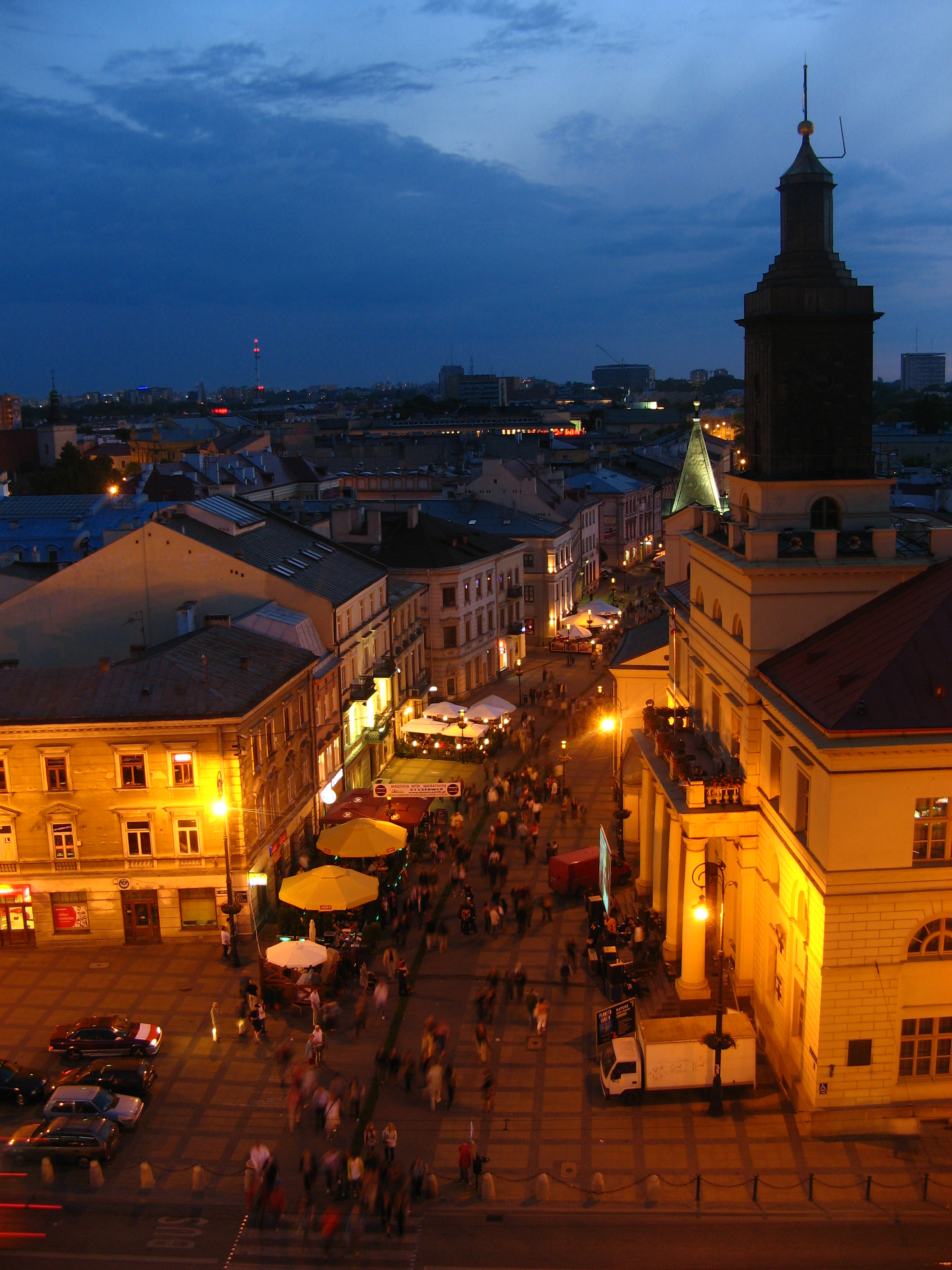 Widok z Bramy Krakowskiej w Lublinie - Nowy Ratusz przy Placu Łokietka i Krakowskim Przedmieściu.